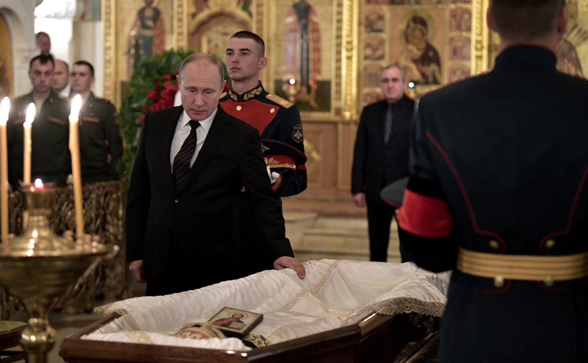 На церемонии прощания с актёром, кинорежиссёром, сценаристом, продюсером, публицистом, политическим и общественным деятелем, депутатом Государственной Думы, председателем комитета Госдумы по культуре Станиславом Говорухиным